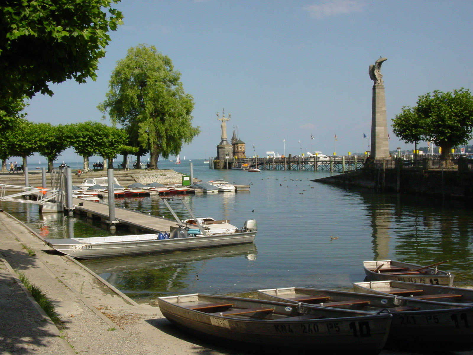 Bodensee in Konstanz, Stako July 2003